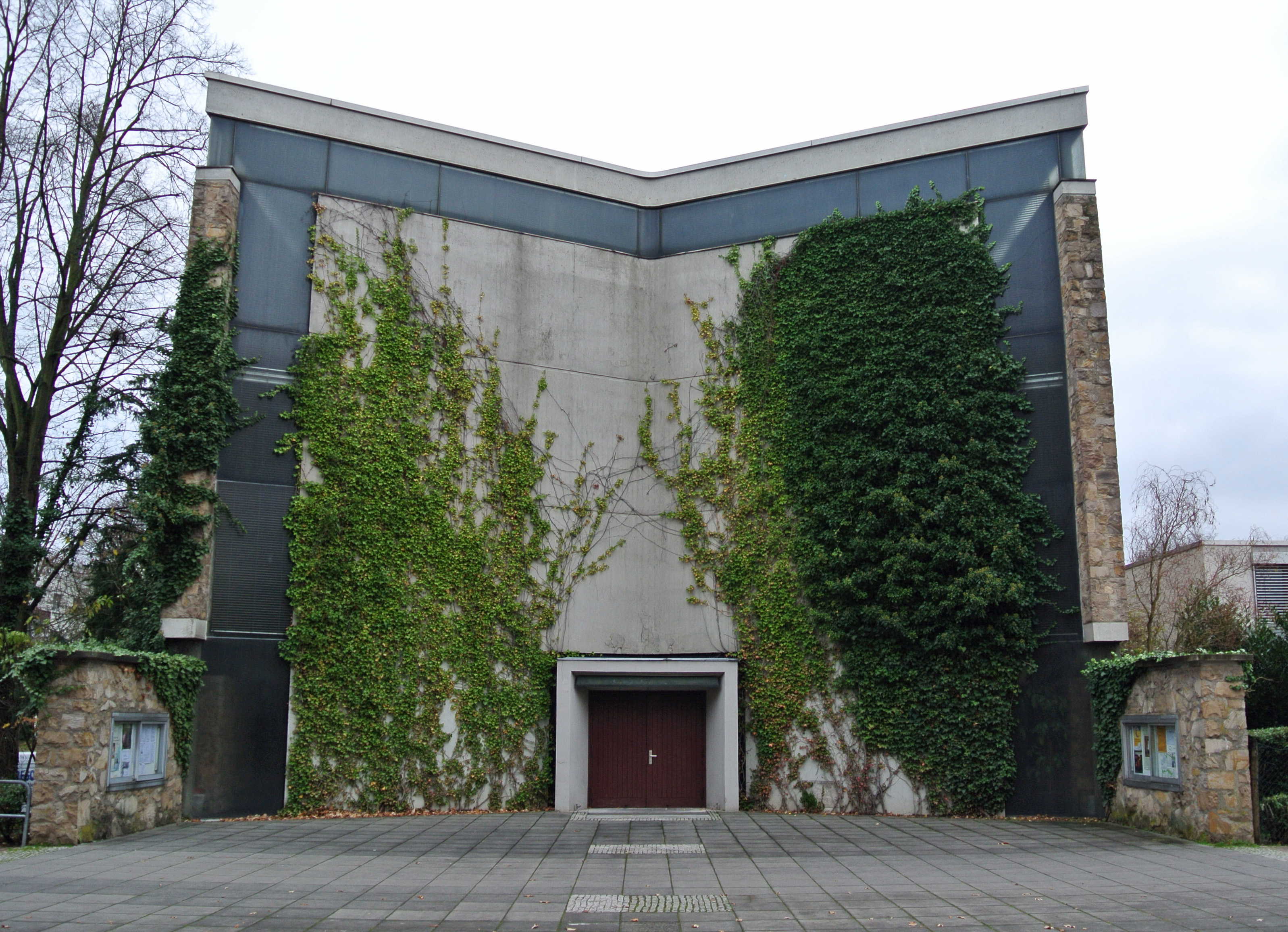 Katholische St. Sebastiankirche in Frankfurt-Nordweststadt, Ernst-Kahn-Straße 47; Bauzeit 1965-1966; Architekt: Johannes Krahn; Baudenkmal